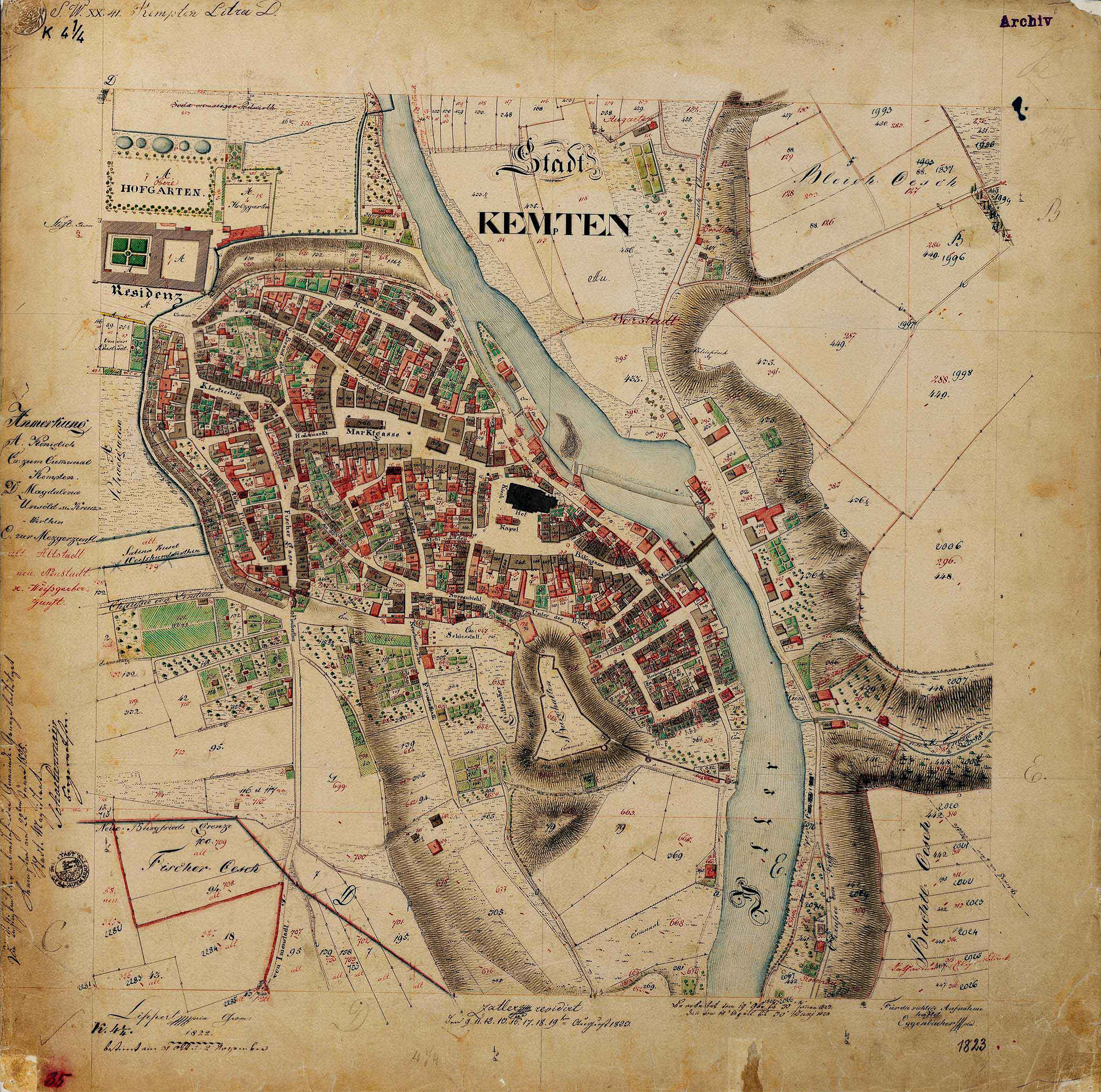 Katastraler Plan der Stadt Kempten aus dem Jahr 1823